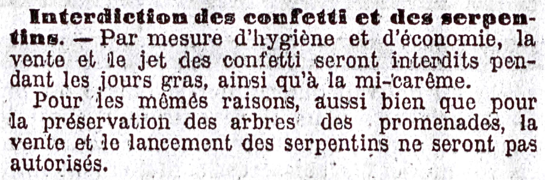 Article du journal "Le Temps", page 3, 3ème colonne, à propos de l'interdiction des confetti et serpentins au Carnaval de Paris.